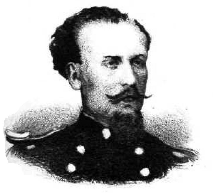 Griechischer Freiheitskämpfer, 19. Jahrhundert